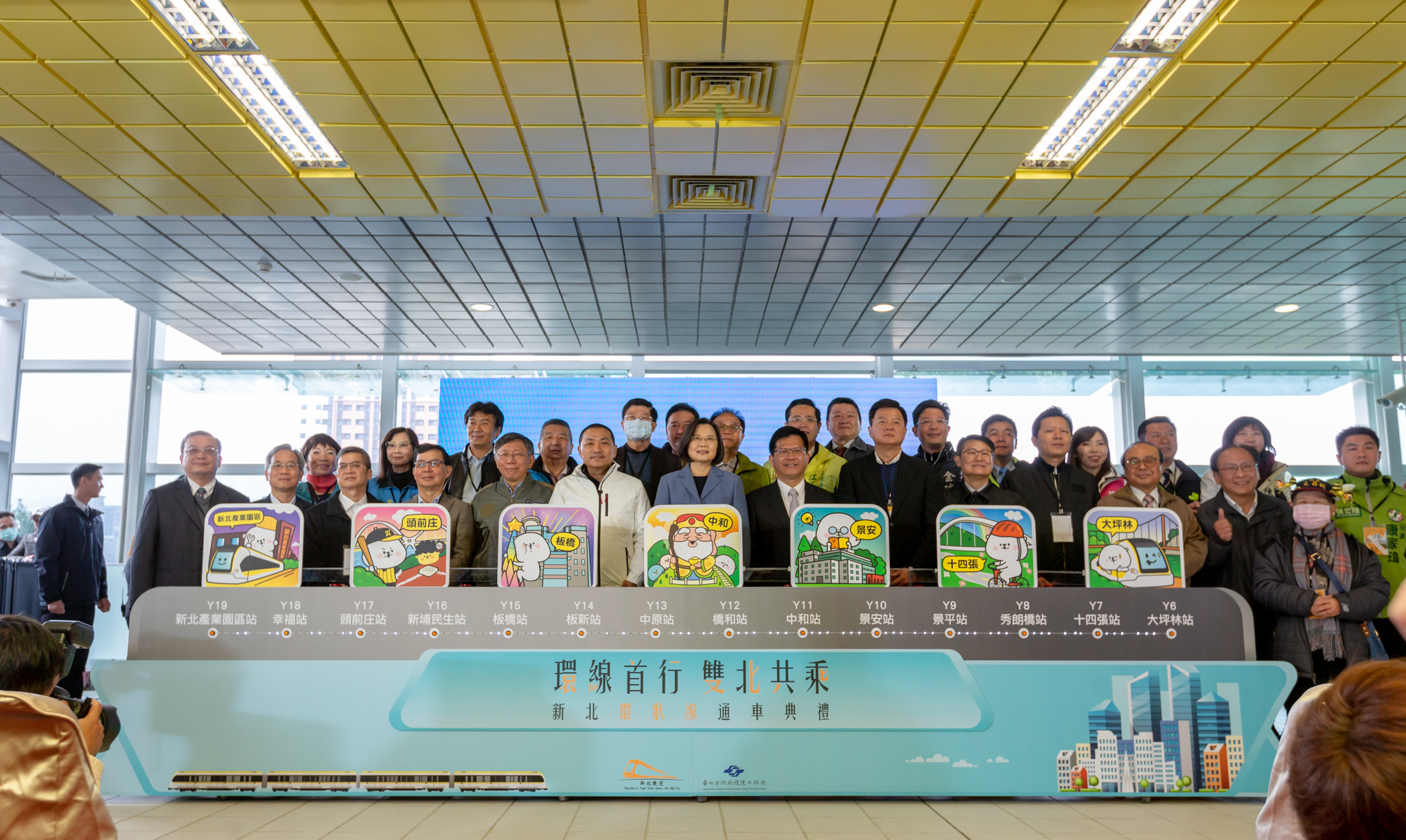 台北捷運環状線十四張駅での開業式典。最前列左から5人目より順に台北市市長柯文哲、新北市市長侯友宜、中華民国総統蔡英文、交通部部長林佳龍、元台北県県長周錫瑋。